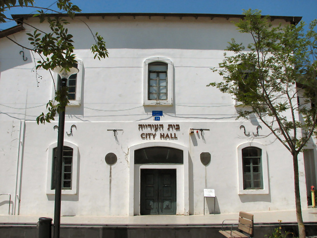 רחוב רוטשילד 24, ראשון לציון (במדרחוב). בית העירייה הישן, במקור שימש כבית הרופאים של המושבה.